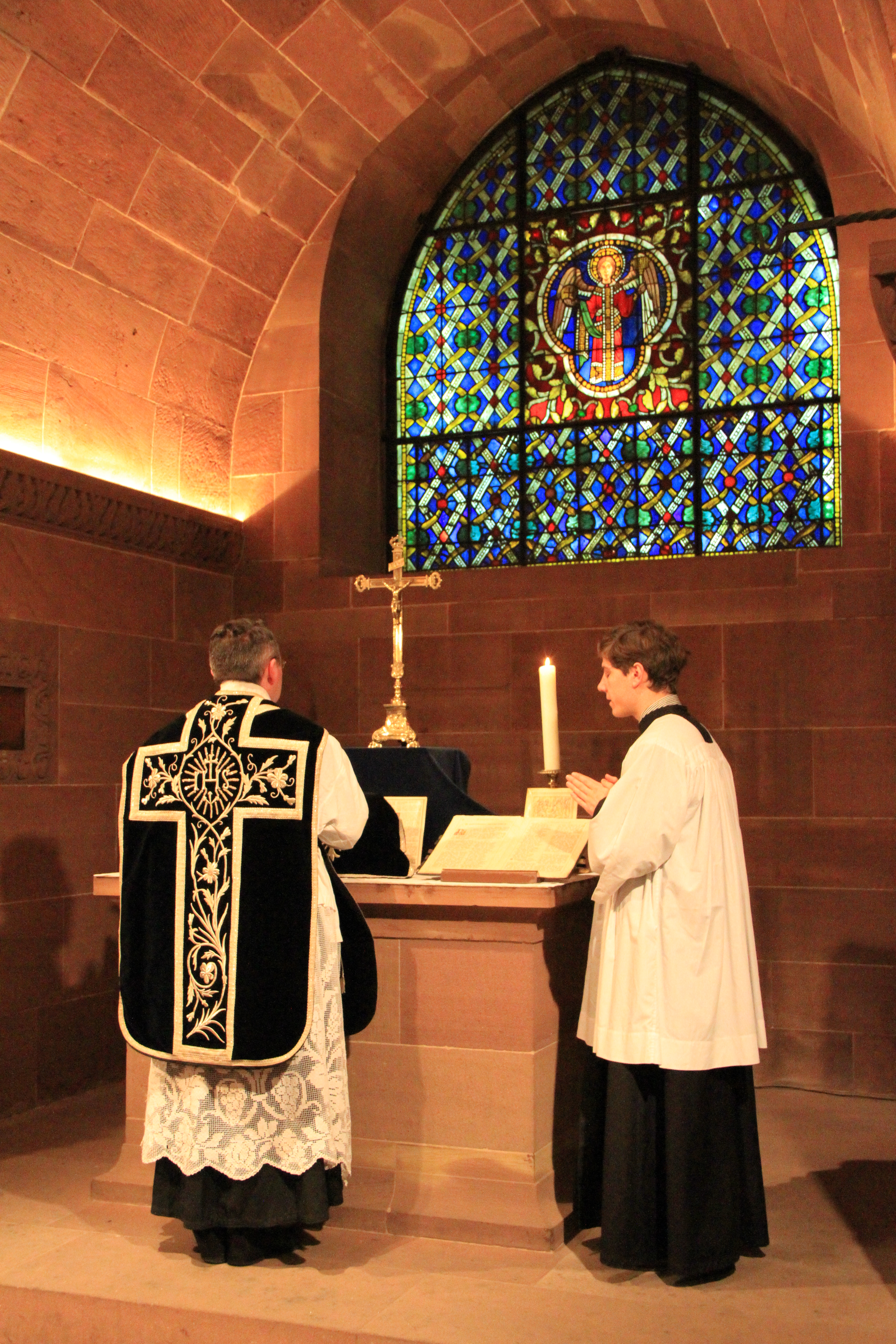 Strasbourg crypte de la cathédrale Notre Dame, messe de Requiem à la mémoire du roy Louis XVI et des martyrs de la Révolution française 19 janvier 2013